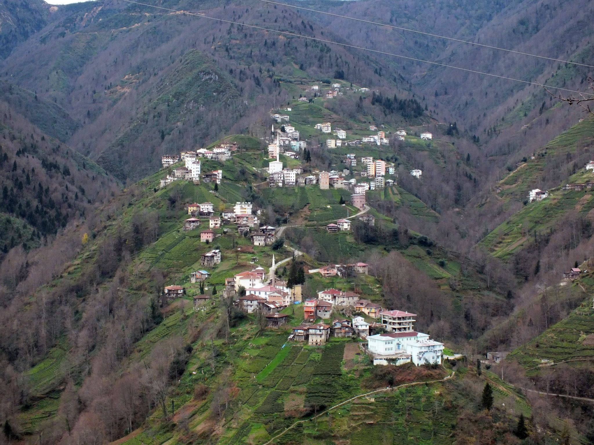 53690 Güneyce/İkizdere/Rize, Turkey